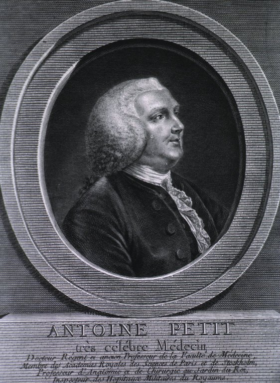 Antoine Petit Dessiné et Gravé par C. Macret en 1775.